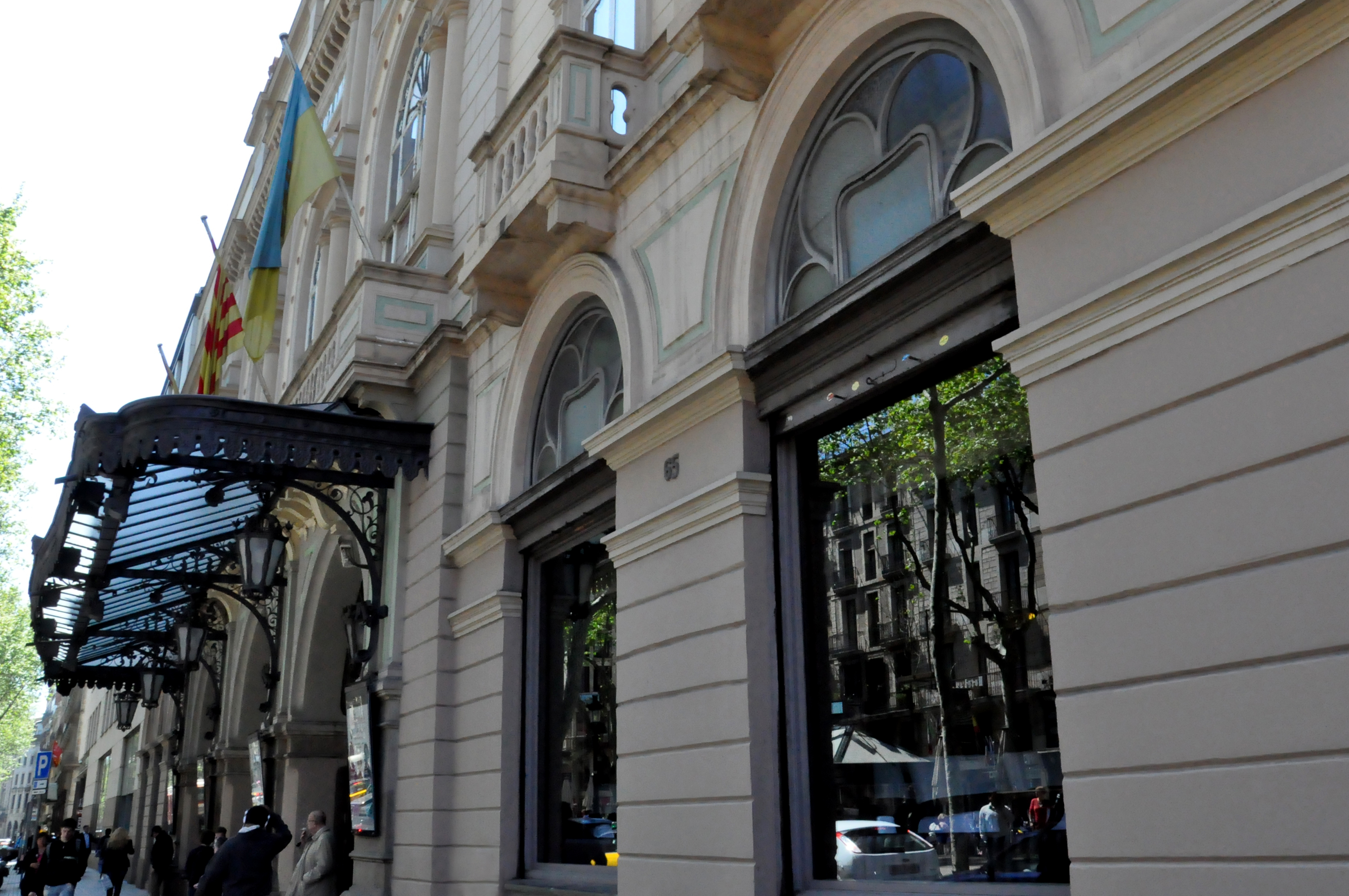 Façana